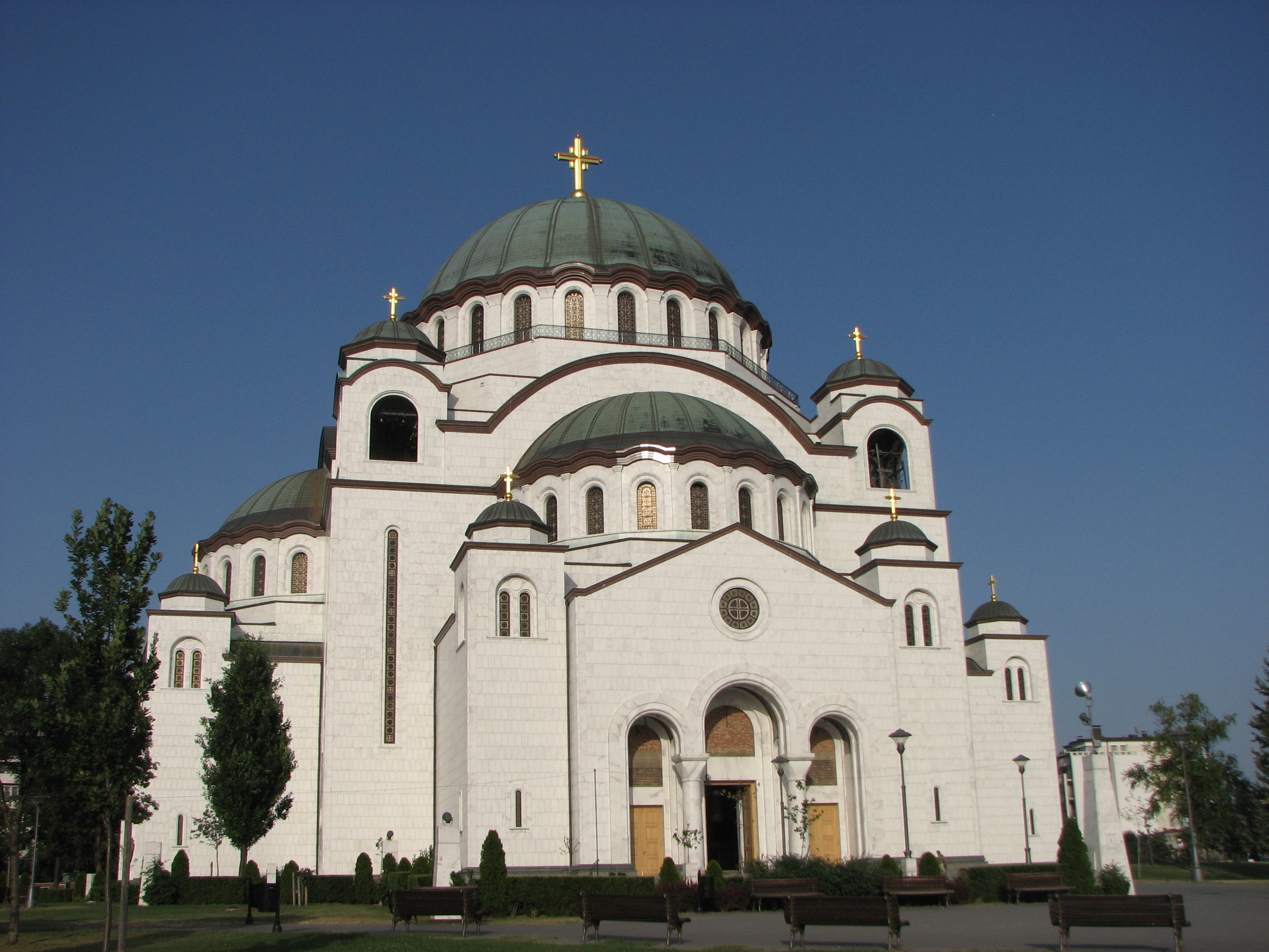 Temple of Saint Sava, Belgrade / Храм Светог Саве, Београд